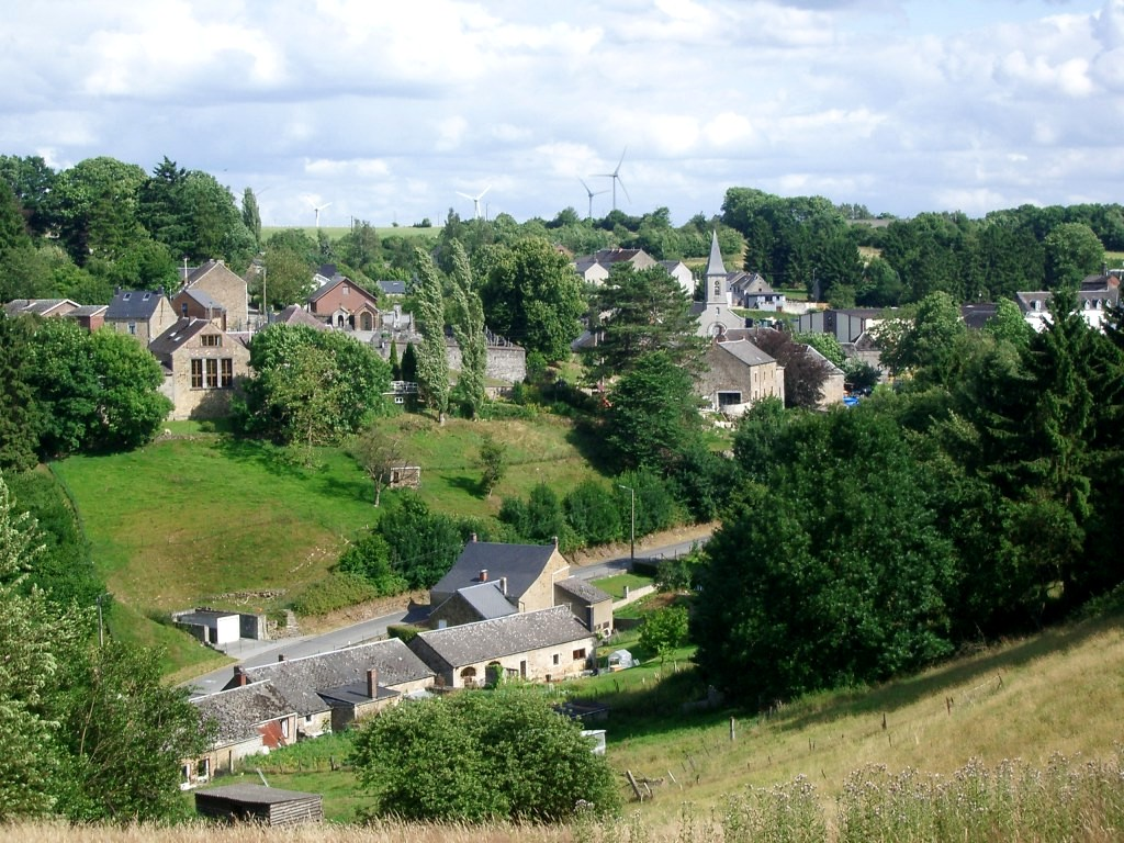 Purnode, vue vers le sud-est sur le village.